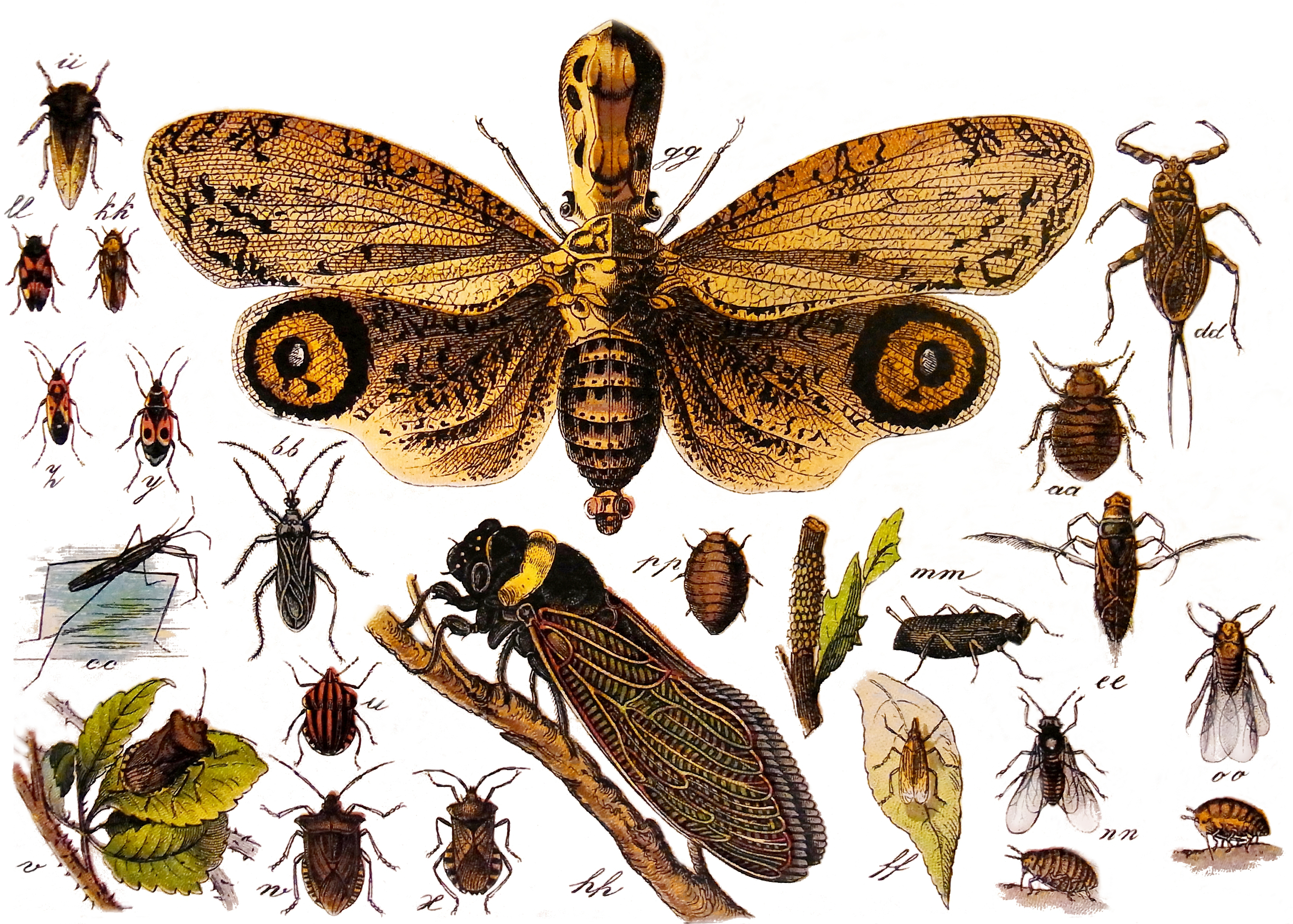 Bearbeiteter Ausschnitt Halbflügler der Tafel XXV links:ii: Centrotus cornutus ll: Cercopis sanguinolenta kk: Philaenus spumarius z: Lygaeus equestris\simulans y: Pyrrhocoris apterus cc: Aquaris paludum bb: Reduvius personatus v: Pentatoma rufipes u: Graphosoma italicum w: Dolycoris baccarum x: Coreus marginatus Mitte:gg: Fulgora laternaria pp: Dactylopius coccus hh: Tacua speciosa rechts:dd: Nepa cinerea aa: Cimex lectularius mm: Macrosiphum rosae ee: Notonecta glauca ff: Dictyophara europaea nn: Eriosoma lanigerum oo: Viteus vitifoliae